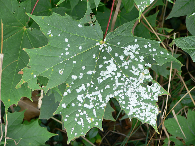 uncinula tulasnei on leaf of acer platanoides L. Bild:UncinulaTulasneiLeaf.jpg